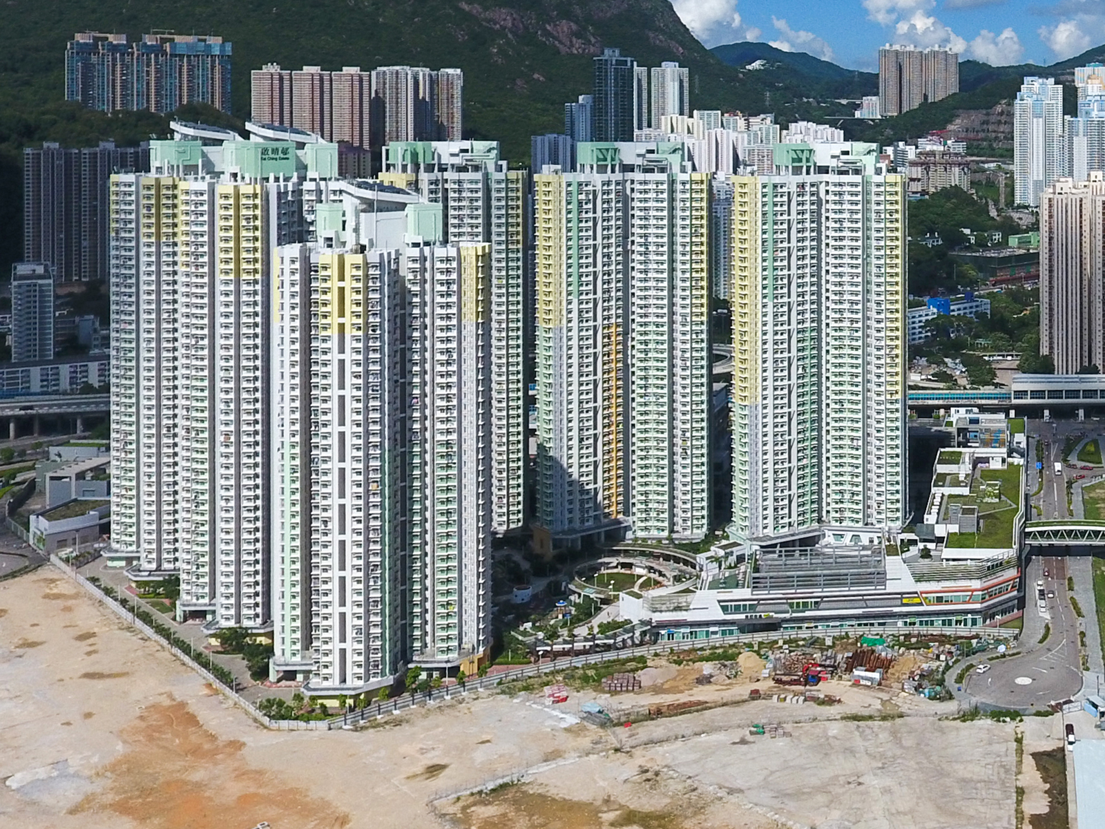 Kai Ching Estate